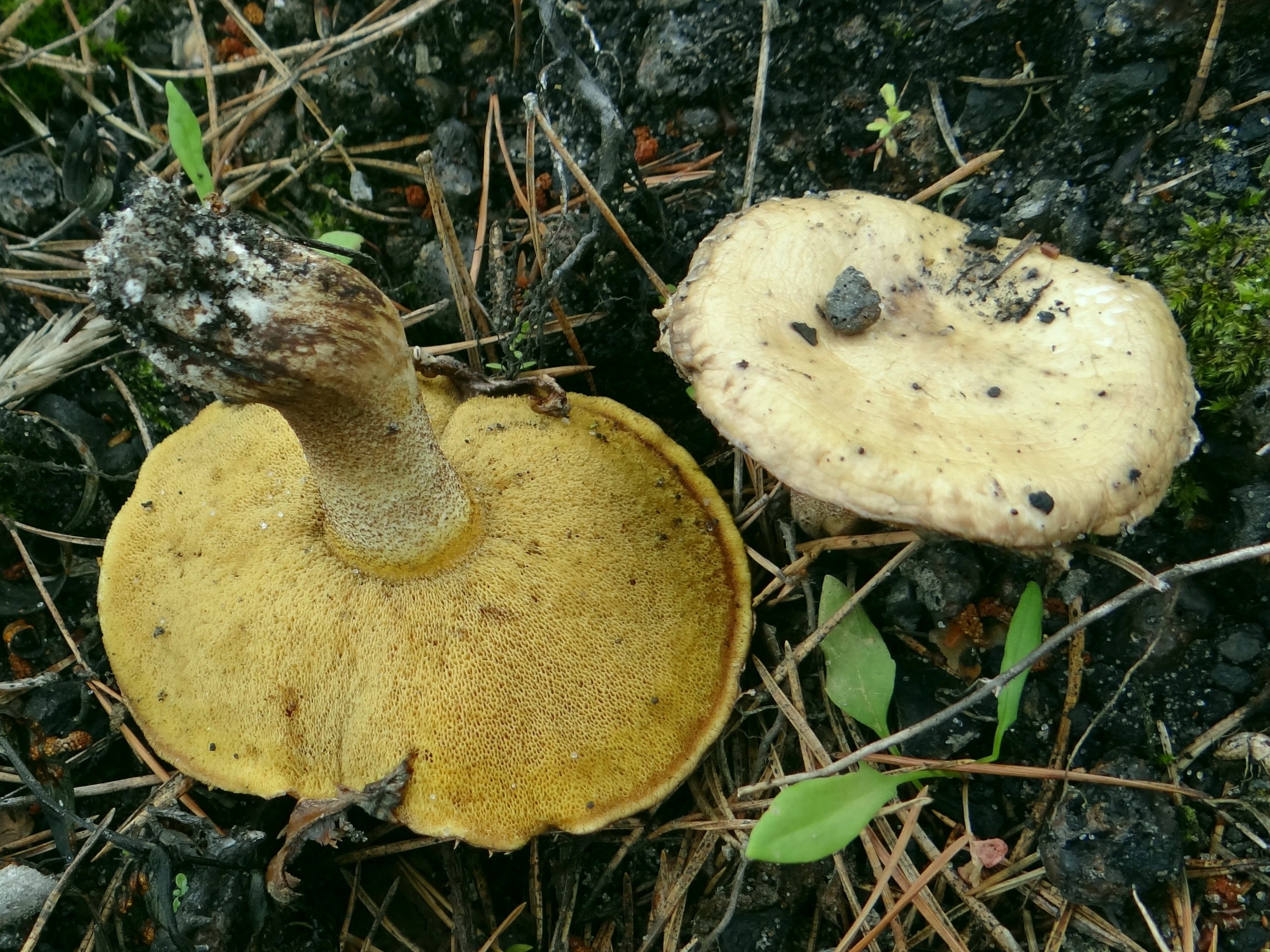 Suillus americanus (location: Poland)